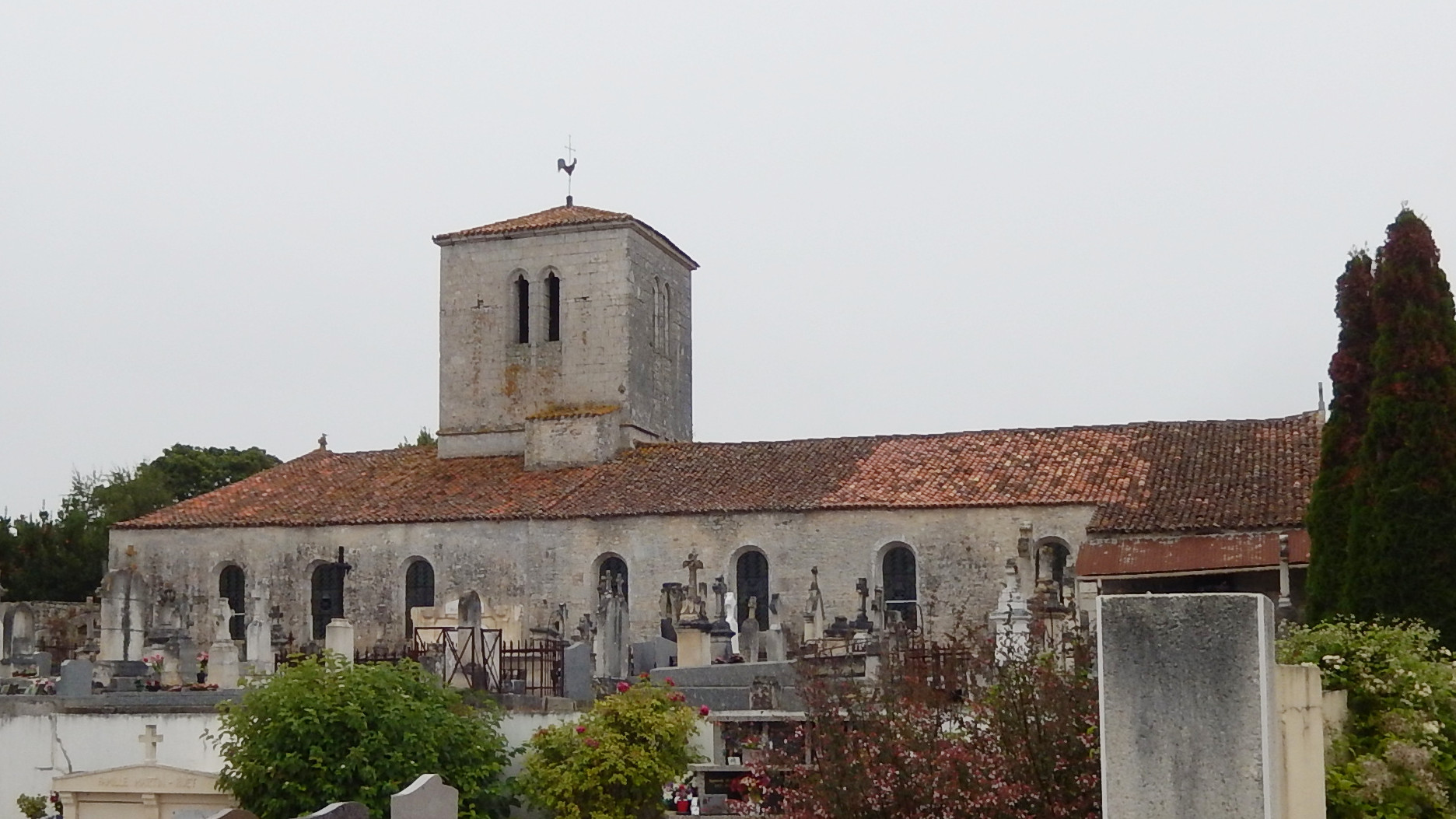 L'église de Saint-Nazaire-sur-Charente (Charente-Maritime, France).